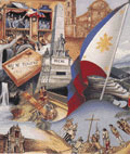 Image symbolique de l'histoire des Philippines